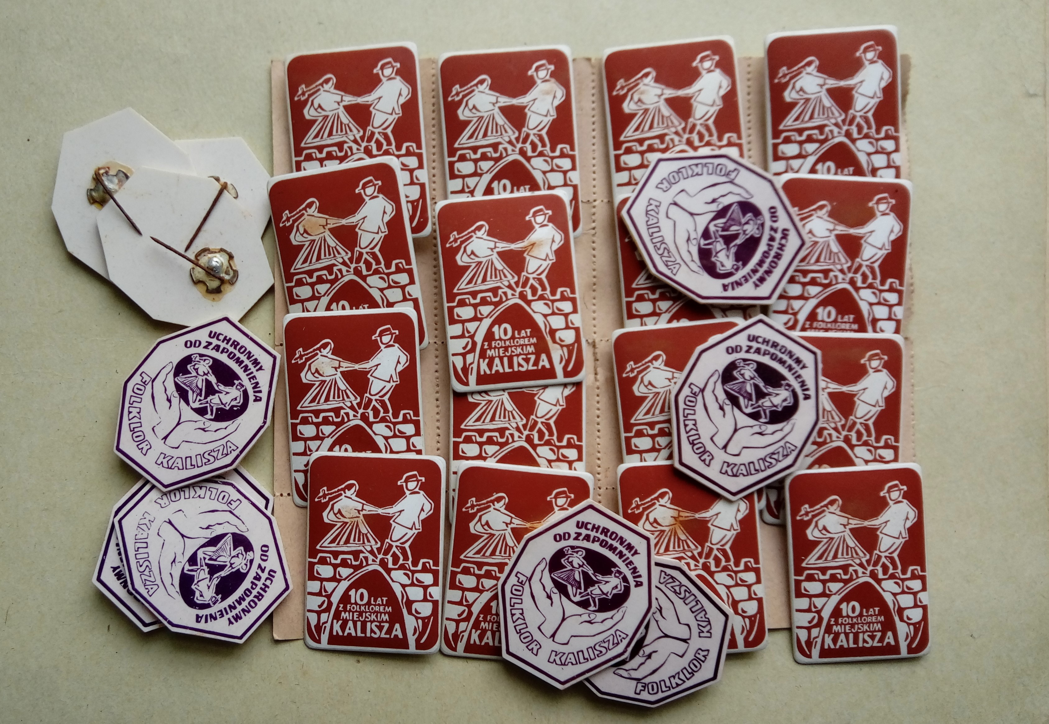 Plakietki promujące folklor kaliski